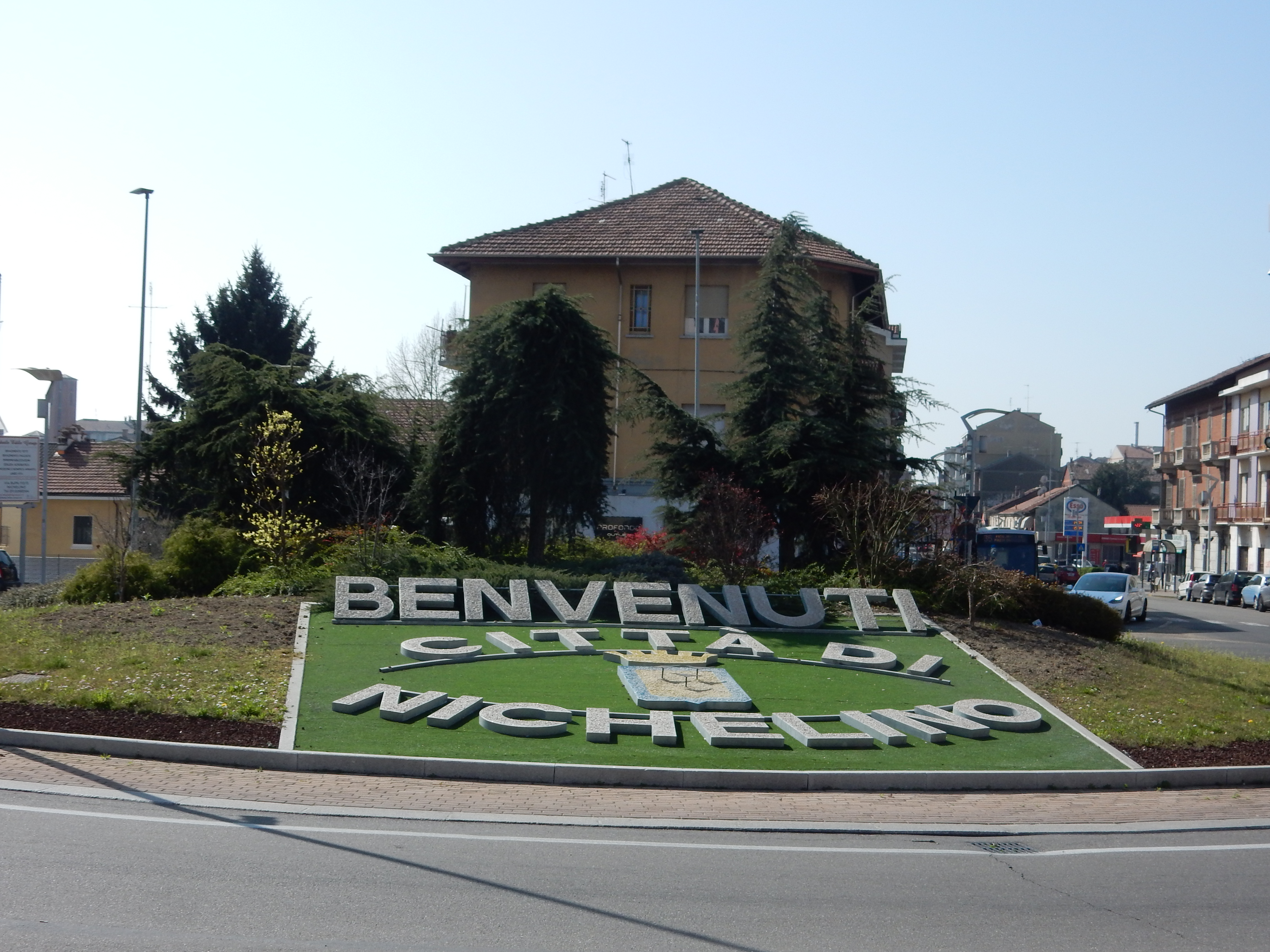 Aiuola di ingresso alla città